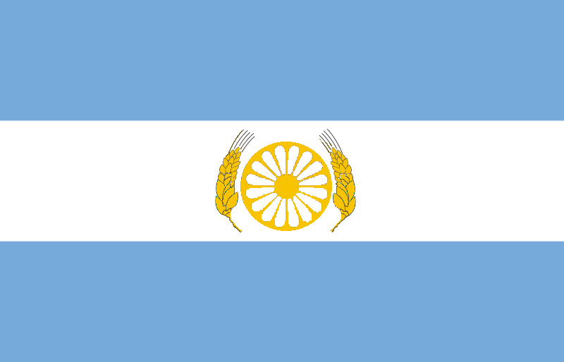 Bandera historica no oficial de Buenos Aires de 1995, creada por el gobierno Cafiero.